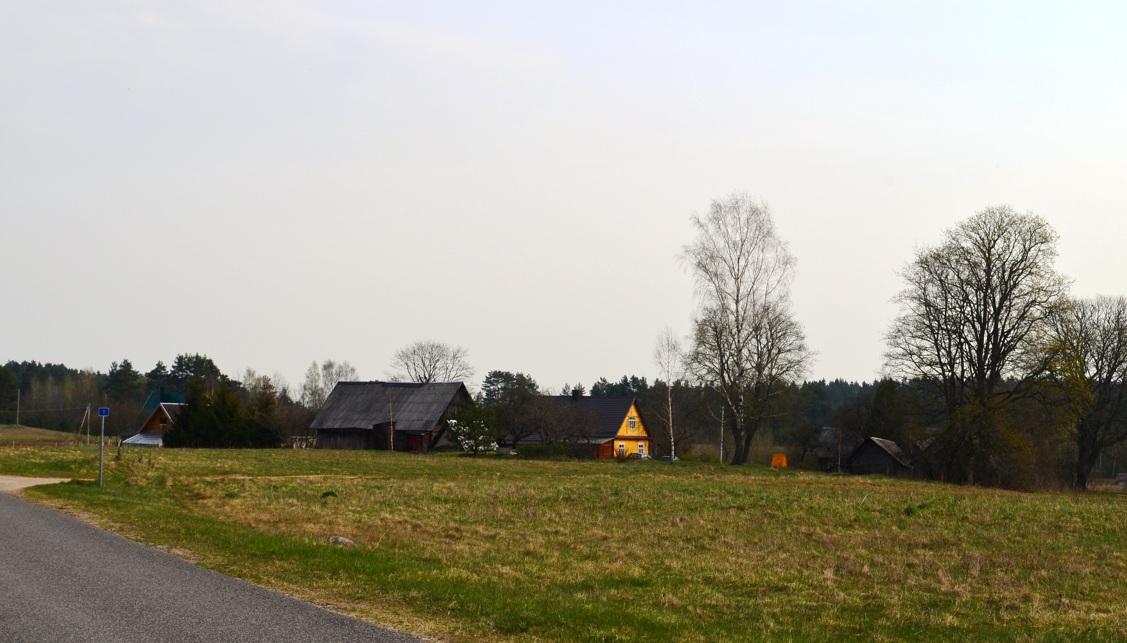 Aidiečiai, Molėtų raj.